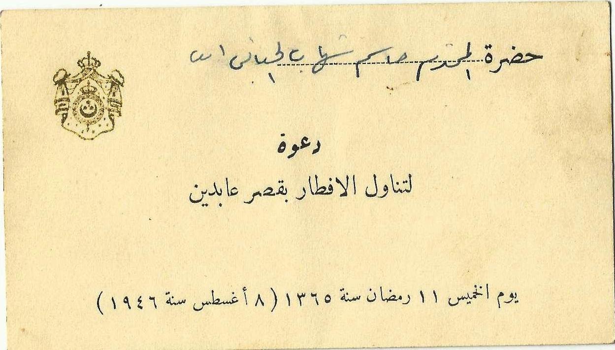 بطاقة دعوة لتناول طعام الإفطار في قصر عابدين موجهة للسيد جاسم شهاب الحياني في العهد الملكي بتاريخ 11 رمضان 1365 الموافق 8 أغسطس 1946